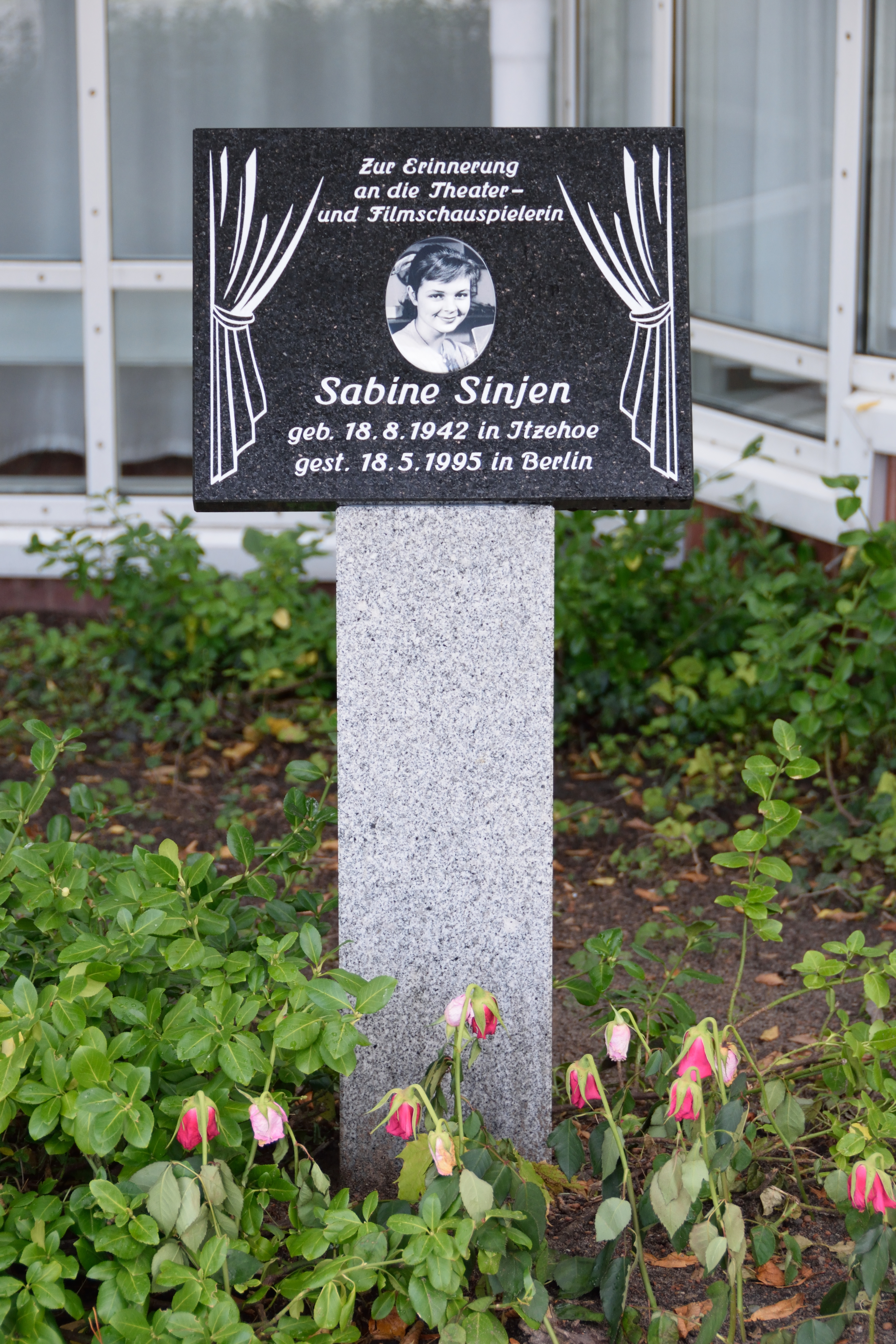 Gedenkstele mit Tafel für Sabine Sinjen am Theater Itzehoe, aufgestellt am 19. August 2014